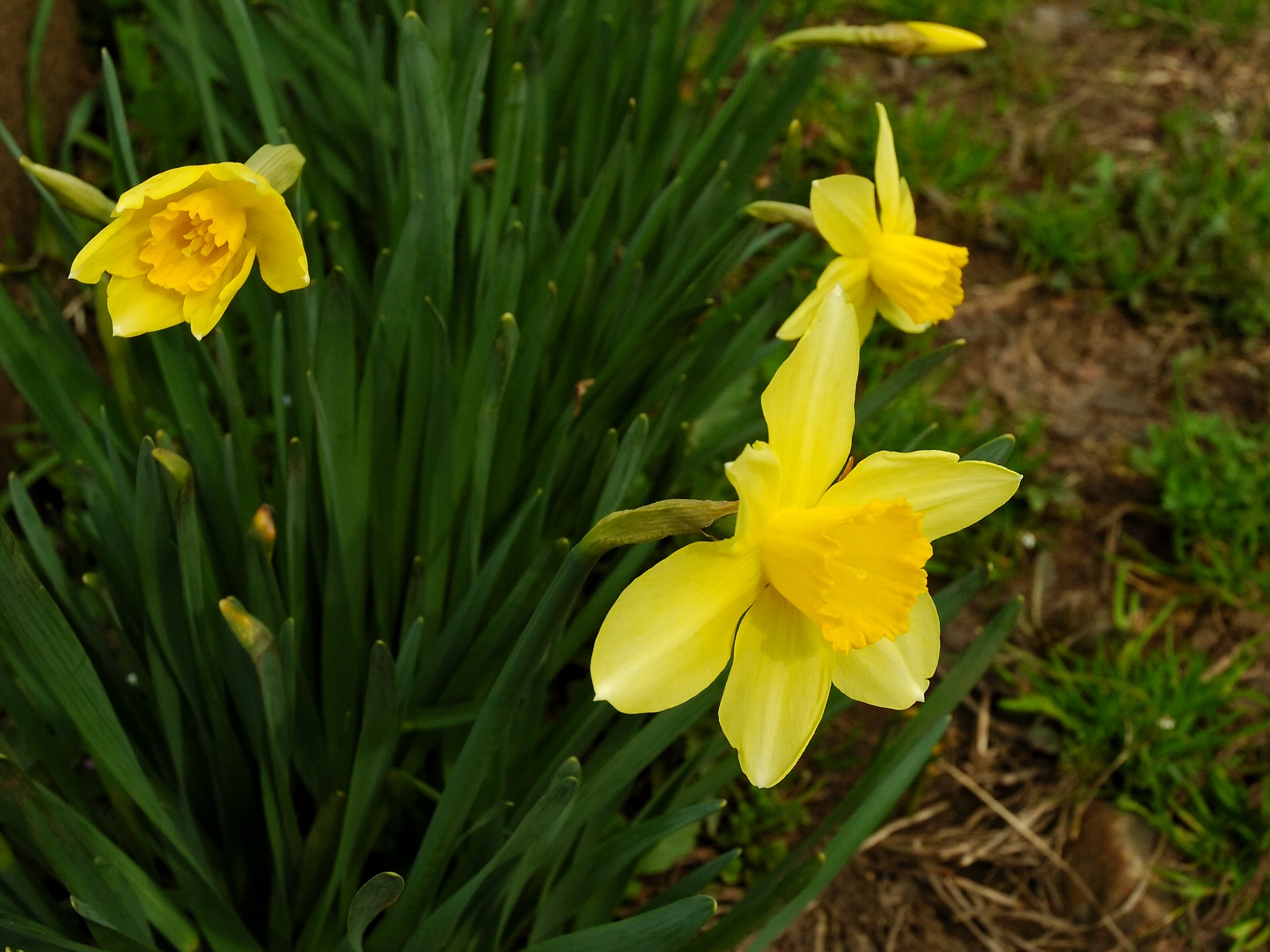 Narcissus (Narcissi,スイセン)